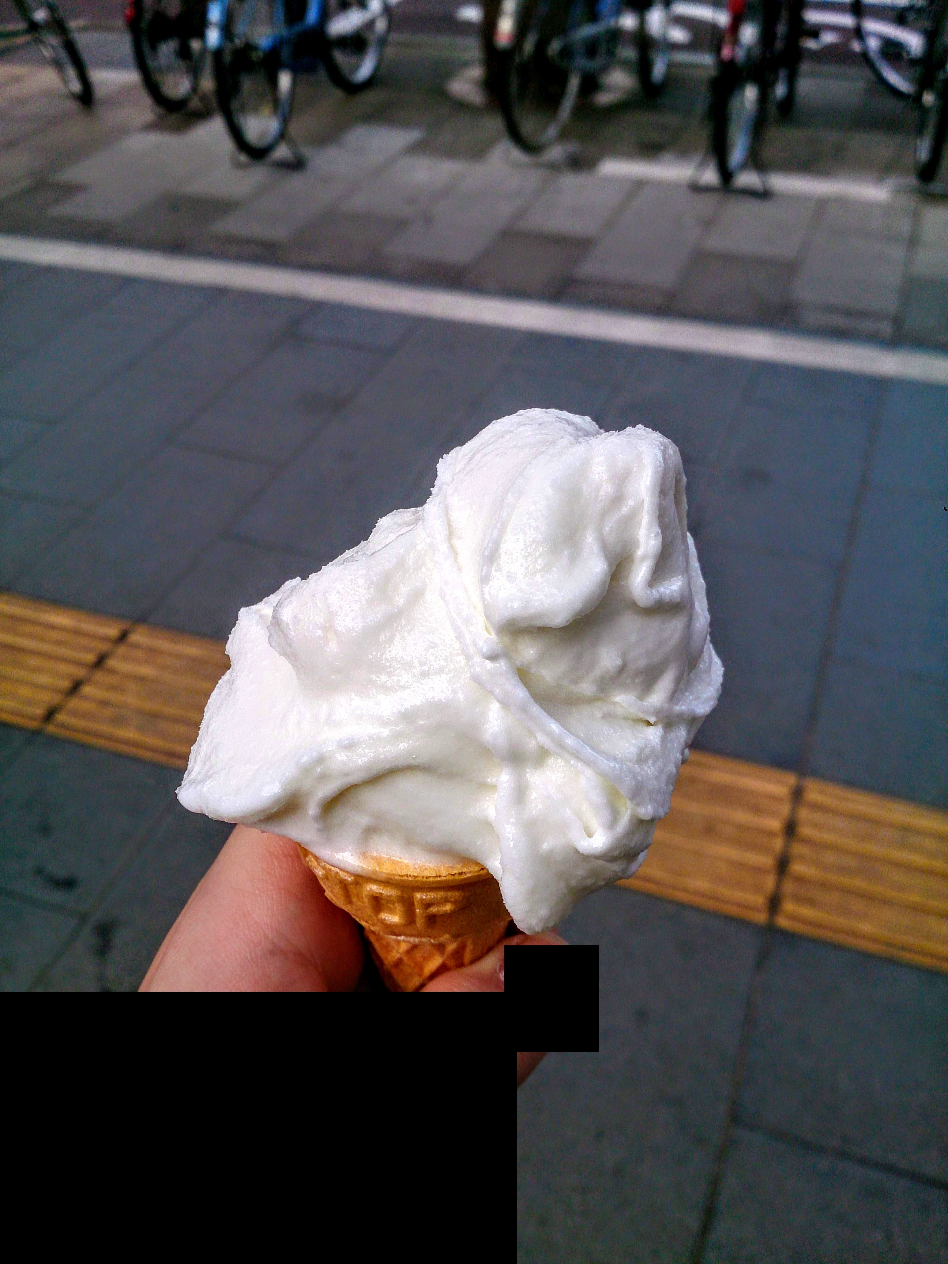 トルコアイス